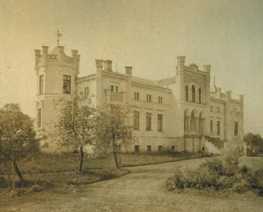 Gutshaus Löwitz um 1830